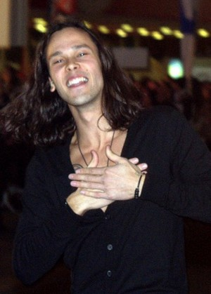 Justin Nozuka aux NRJ Music awards